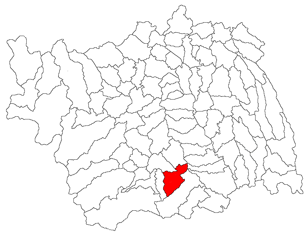 Categorie:Hărţi ale judeţului Bacău